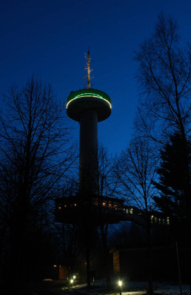 Gaussturm-Illumination